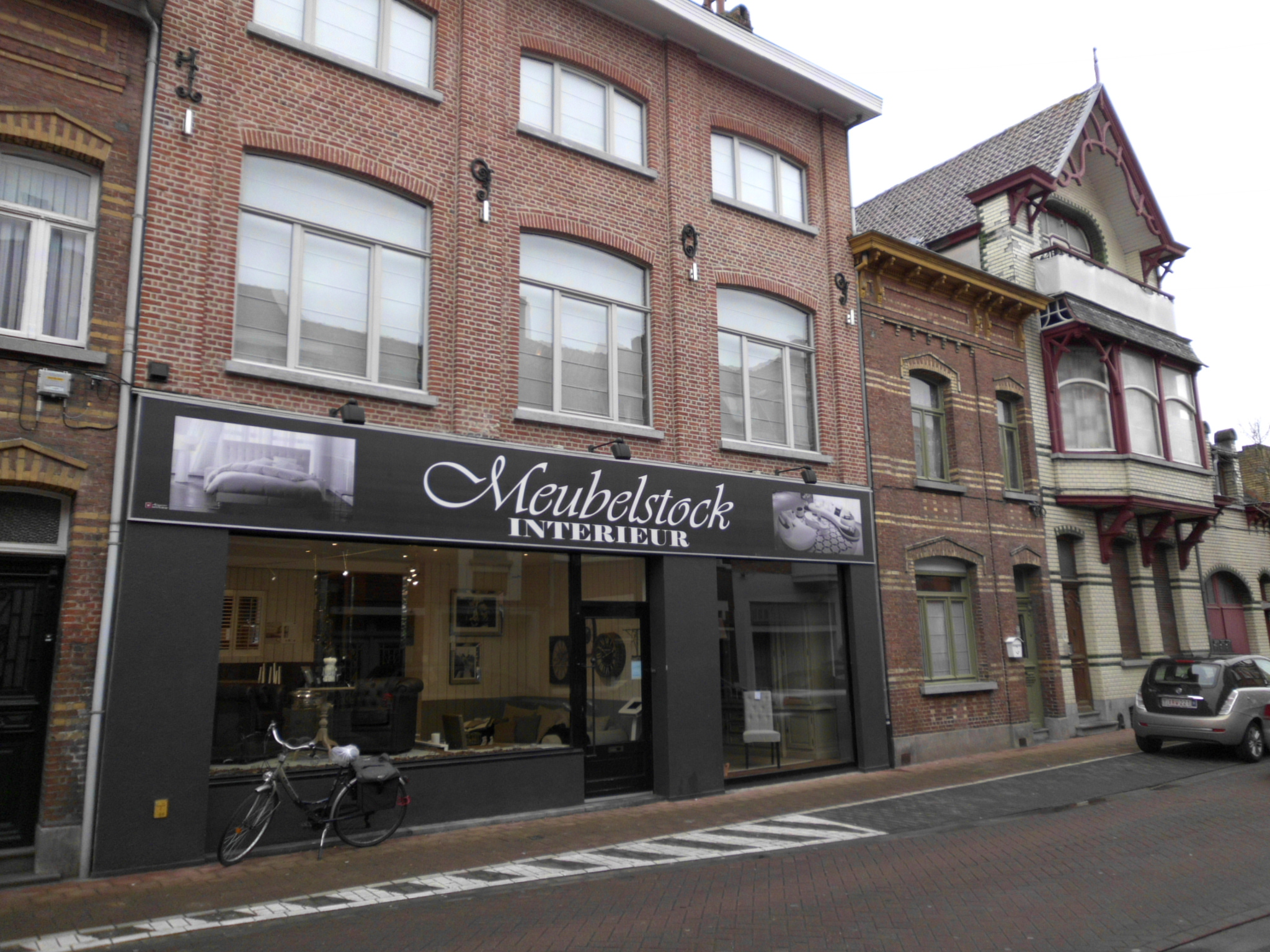 Iama diamantprilaborejo de Alfons Thys je Wantestraat en Assebroek. Maldekstre la laborejo (nun meblovendejo), dekstre la vilao de la posedanto.